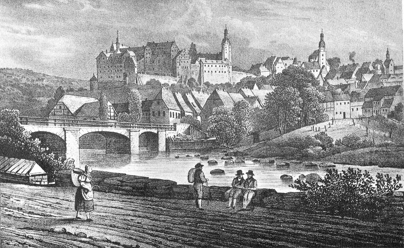 Historische Ansicht von Colditz in Sachsen. Stahlstich.